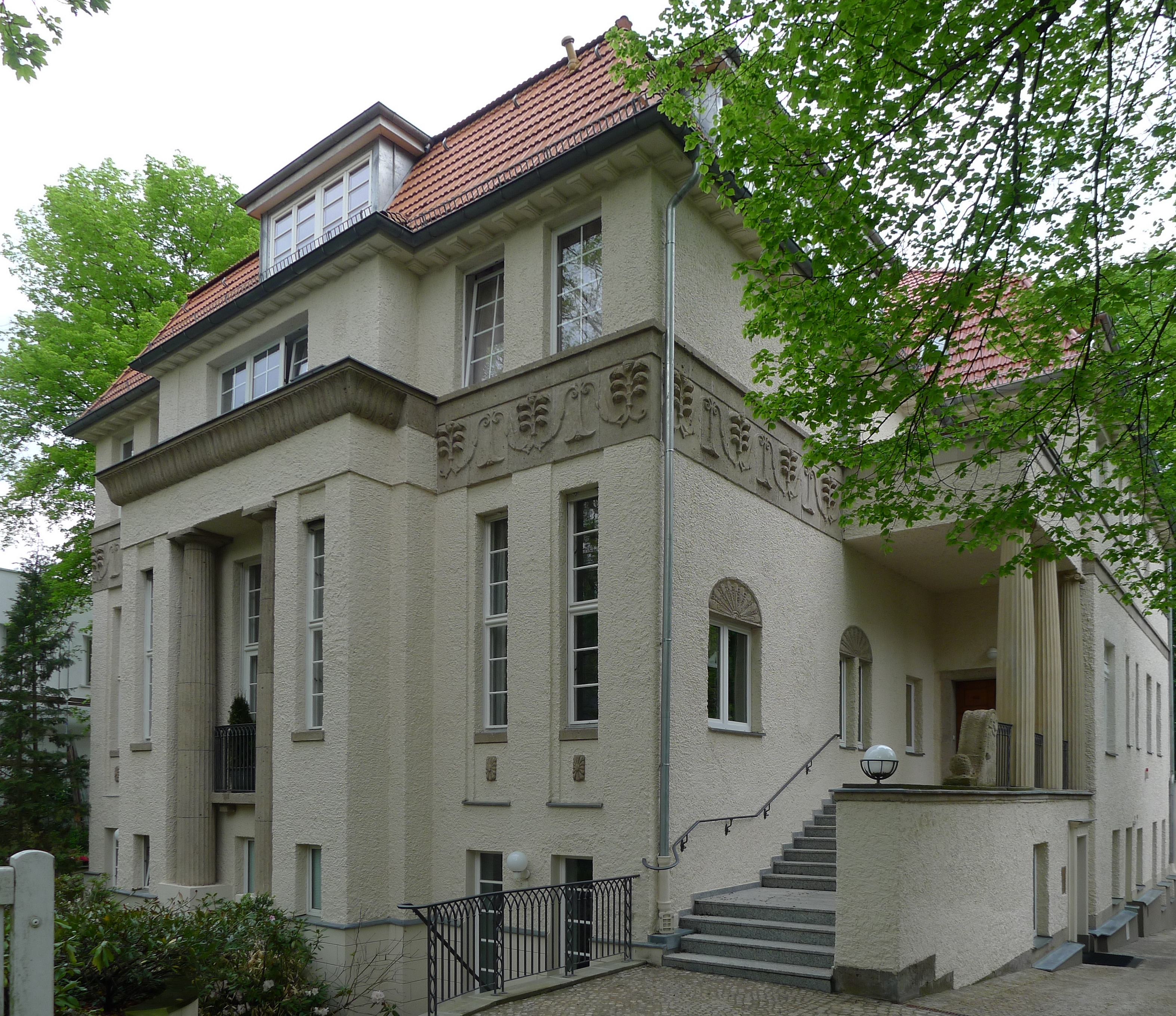 Villa